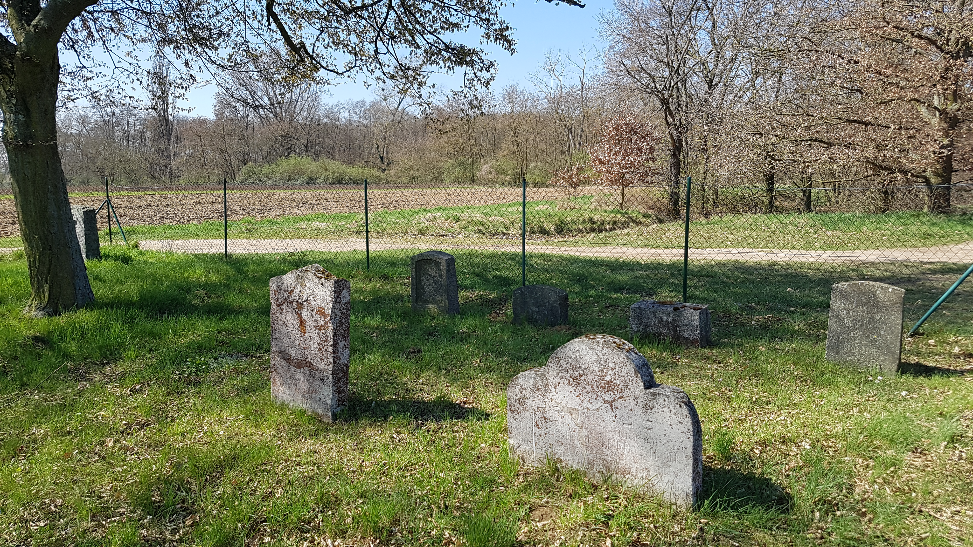 Jüdischer Friedhof von 1910 in Neuhofen (Pfalz); Denkmalzone